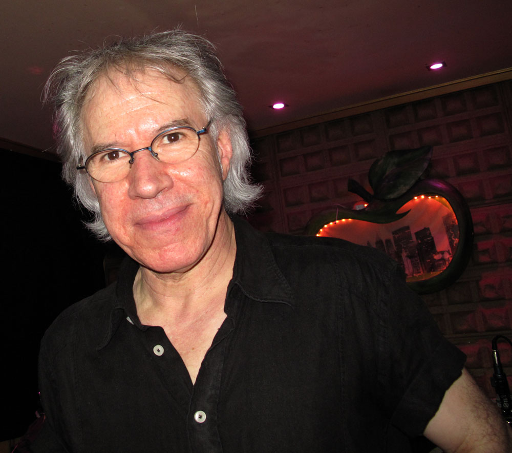 Angel Celada en el bar Estixu de Vitoria (España), tras el concierto ofrecido el 13 de julio de 2011